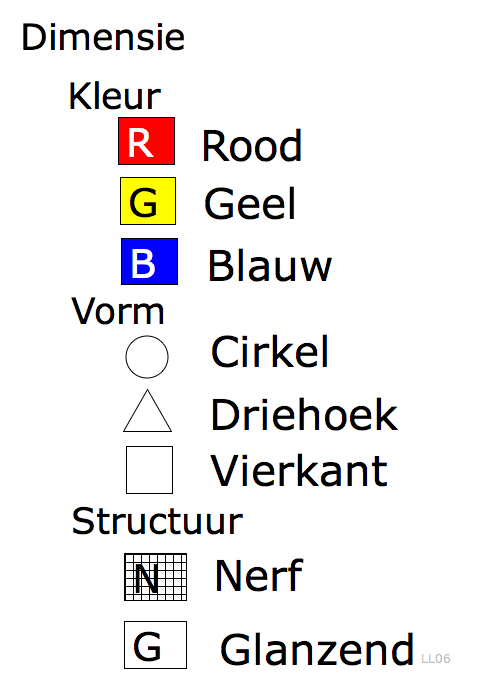 Morfologisch overzicht van begrippen. juni 2006 Laurens van Lieshout.